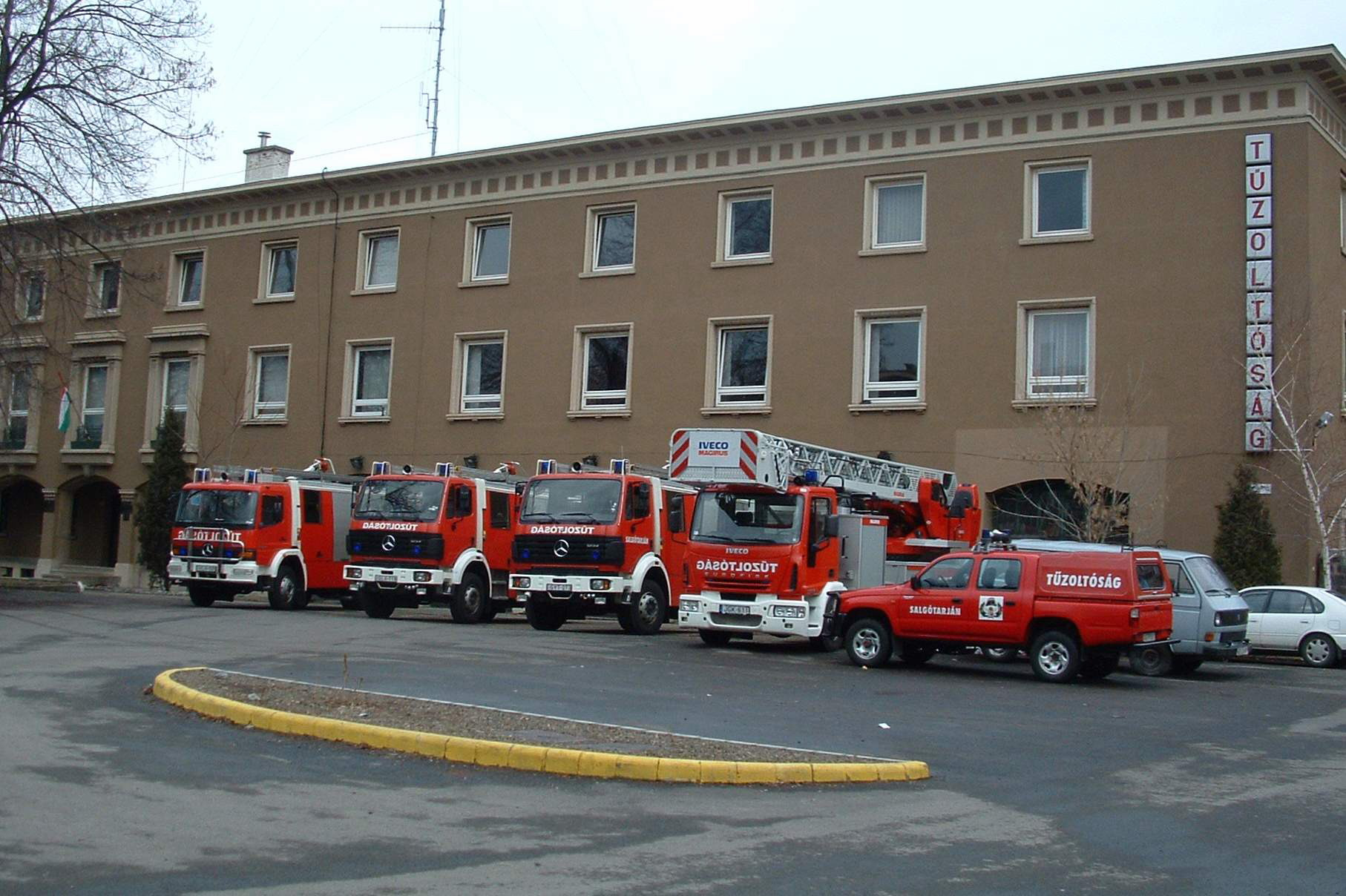 Salgótarján tűzoltósága (Salgótarján, Szent Flórián tér 1.)